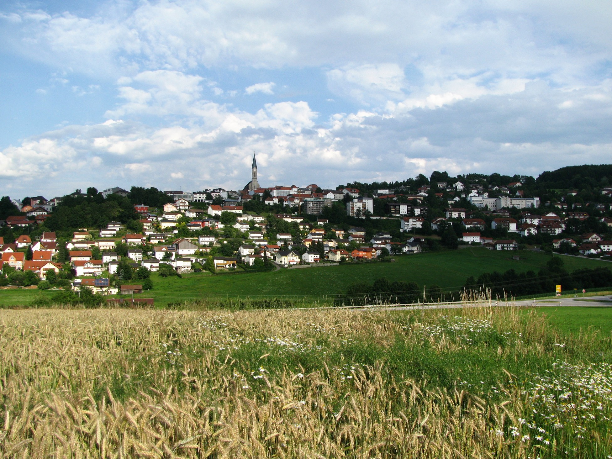 Waldkirchen im Bayerischen Wald; Stadtansicht aus Westnordwest